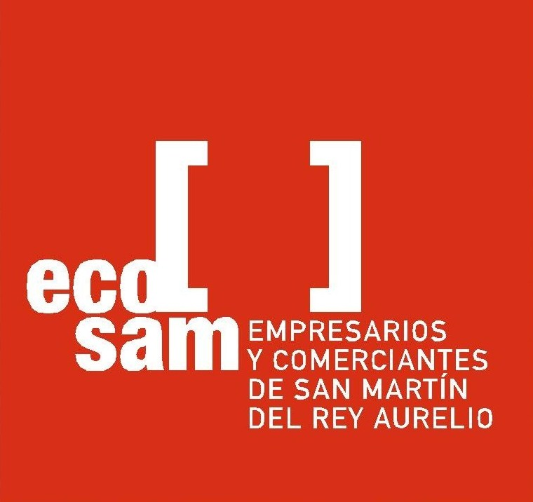 Logotipu d'ECOSAM